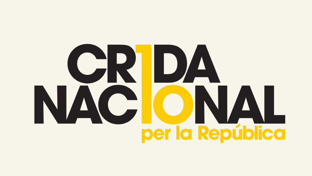 Logotipo oficial